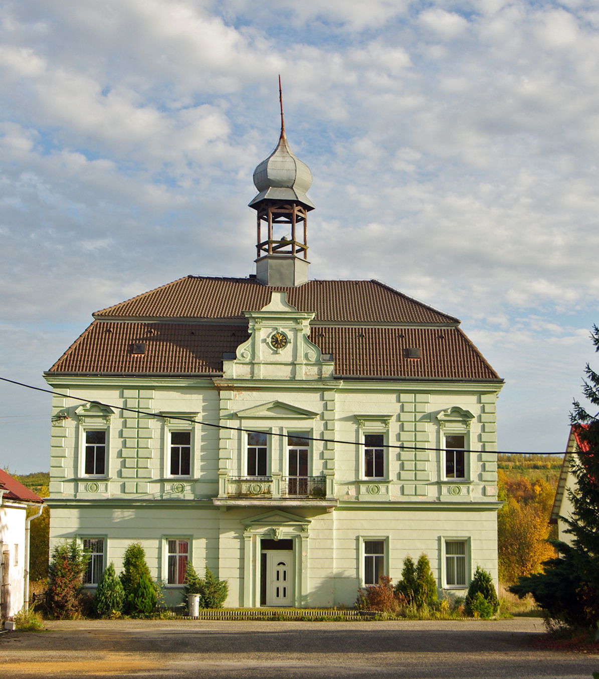 Lítov, okr. Sokolov, zámek; více